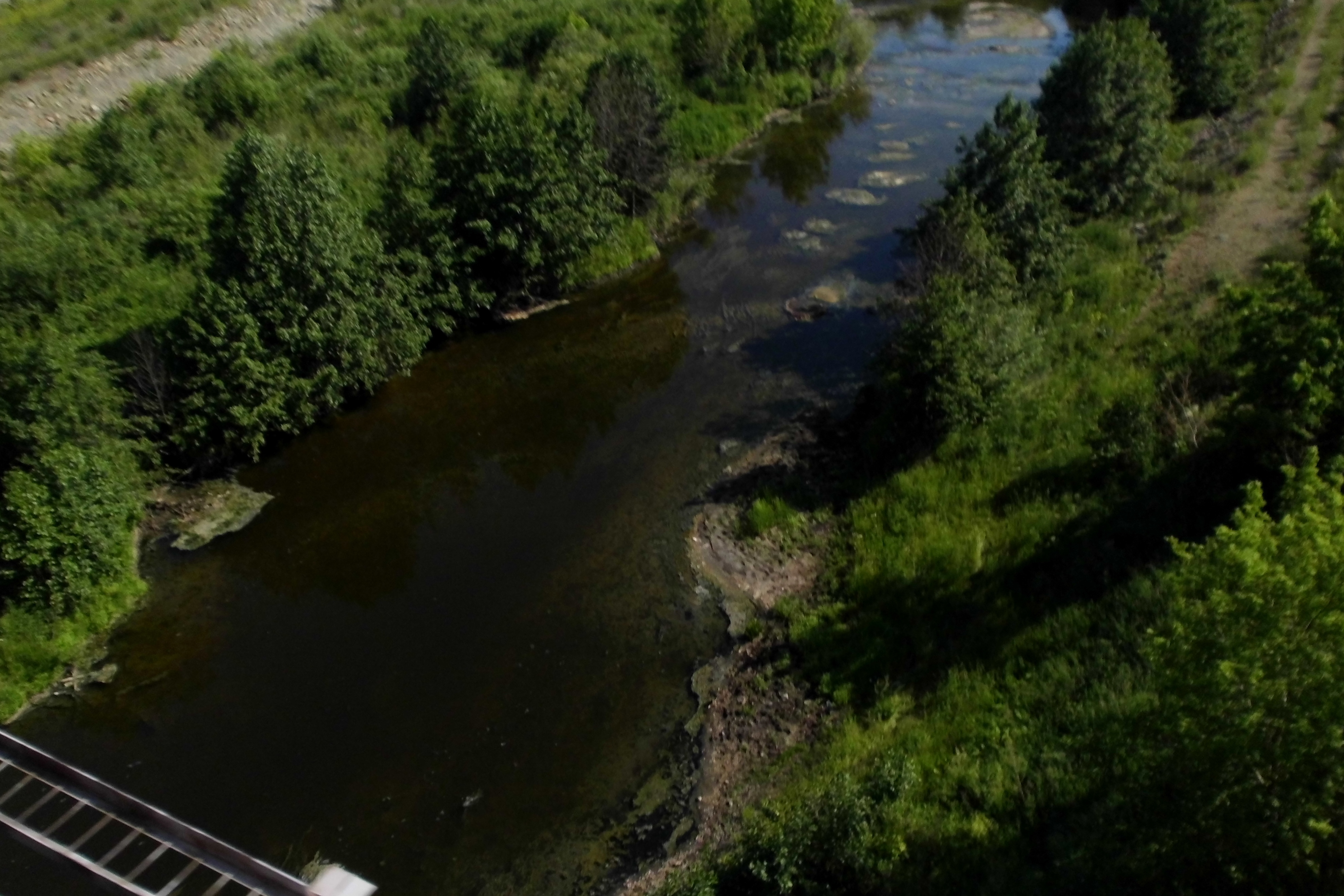 Река Теча возле посёлка Муслюмово. Вид в восточном направлении ниже по течению от железнодорожного моста.